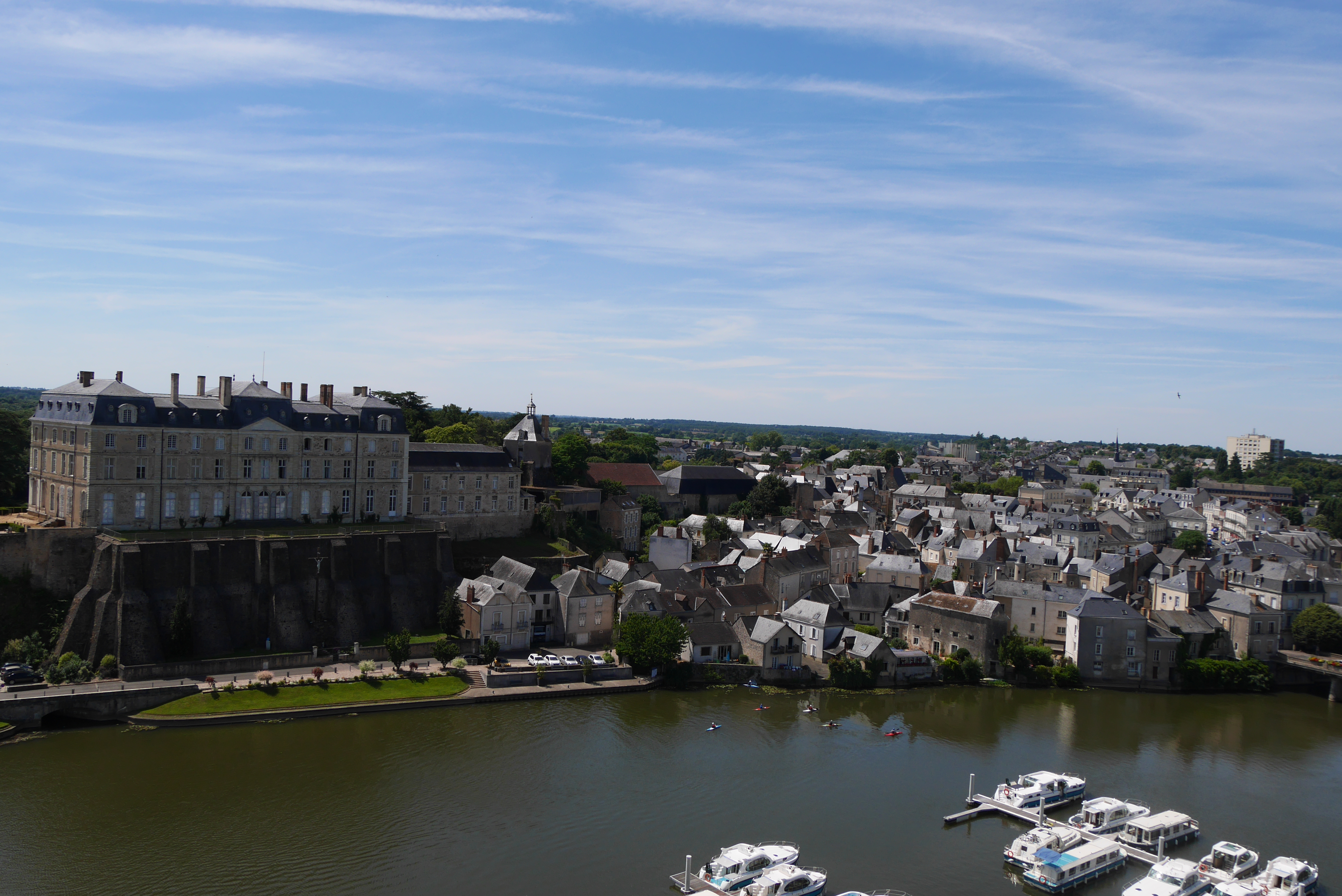 Vue du Château, du centre ville et du port de Sablé-sur-Sarthe, depuis le clocher de l'église Notre-Dame